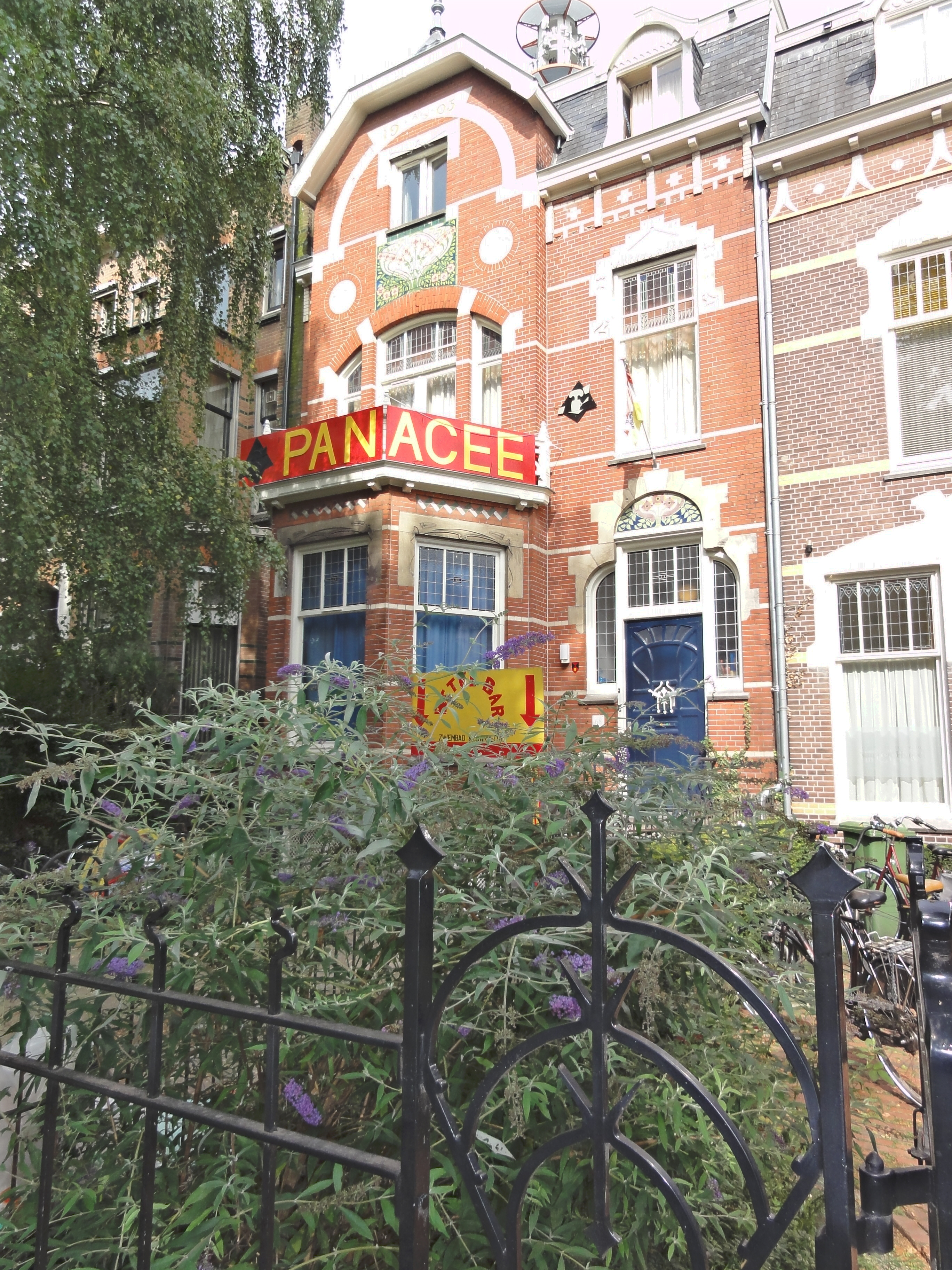 Nijmegen Rijksmonument 522996 Oranjesingel68